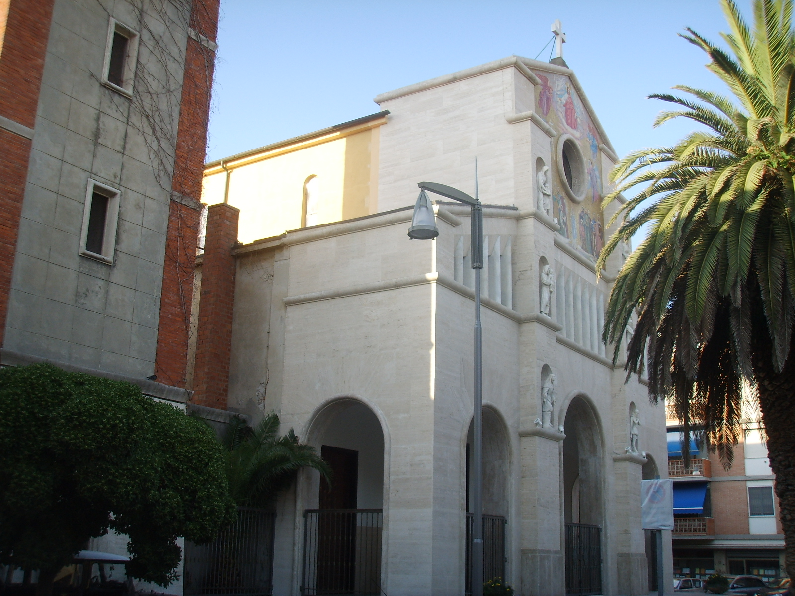 Viareggio, chiesa di san paolino facciata